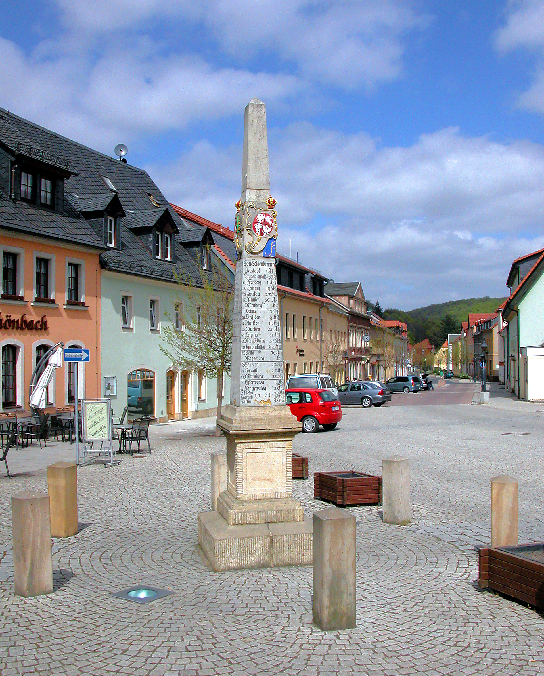 20.04.2007 01816 Bad Gottleuba (Bad Gottleuba-Berggießhübel): Auf dem Marktplatz steht die kursächsische Postdistanzsäule (GMP: 50.849185,13.941948) mit den verschlungenen Initialen des damaligen Landesherren, "AR" für Augustus Rex. [DSCN22022.TIF]20070420070DR.JPG(c)Blobelt